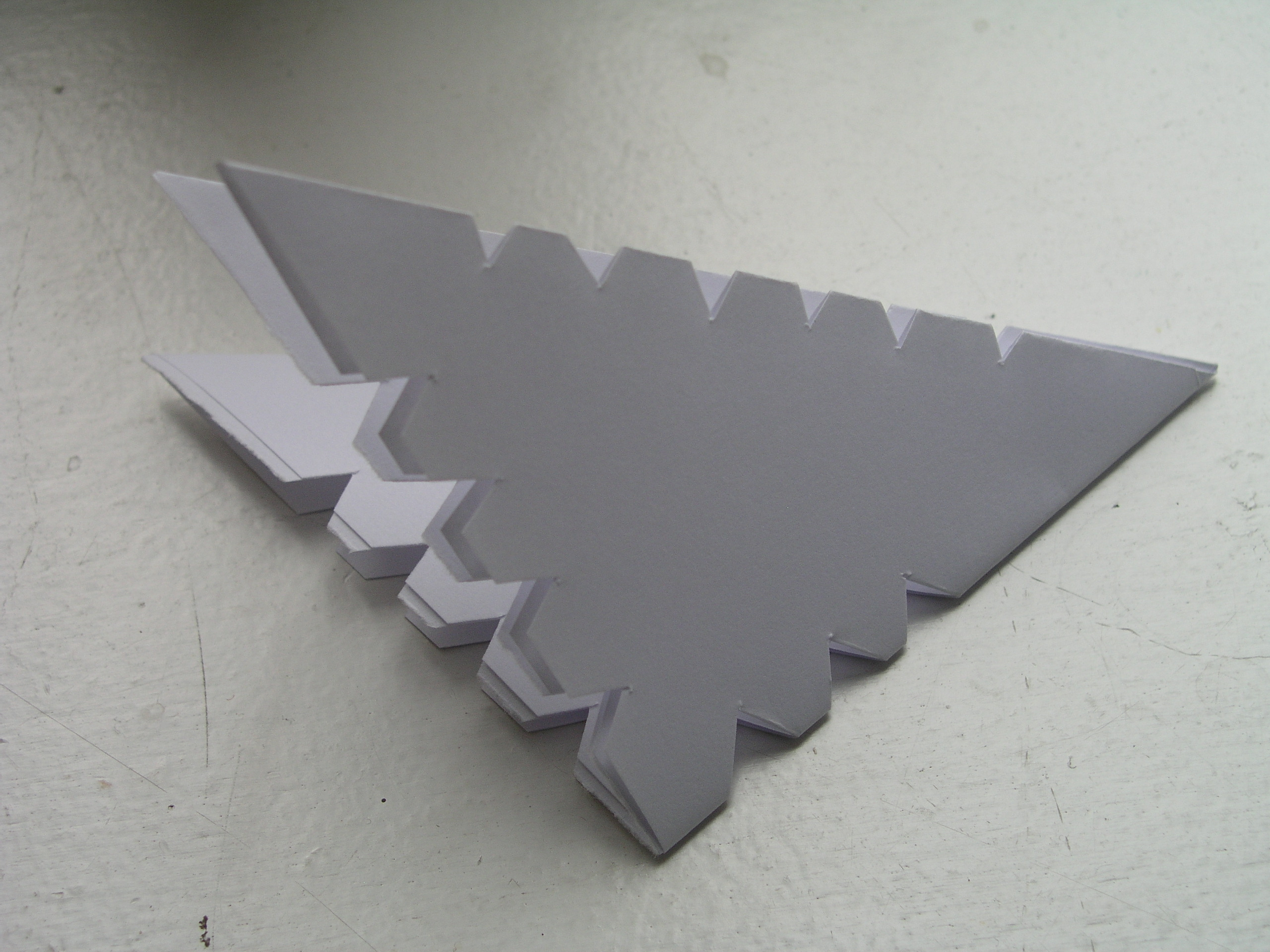 Gækkebrev (Danish Easter Letter)